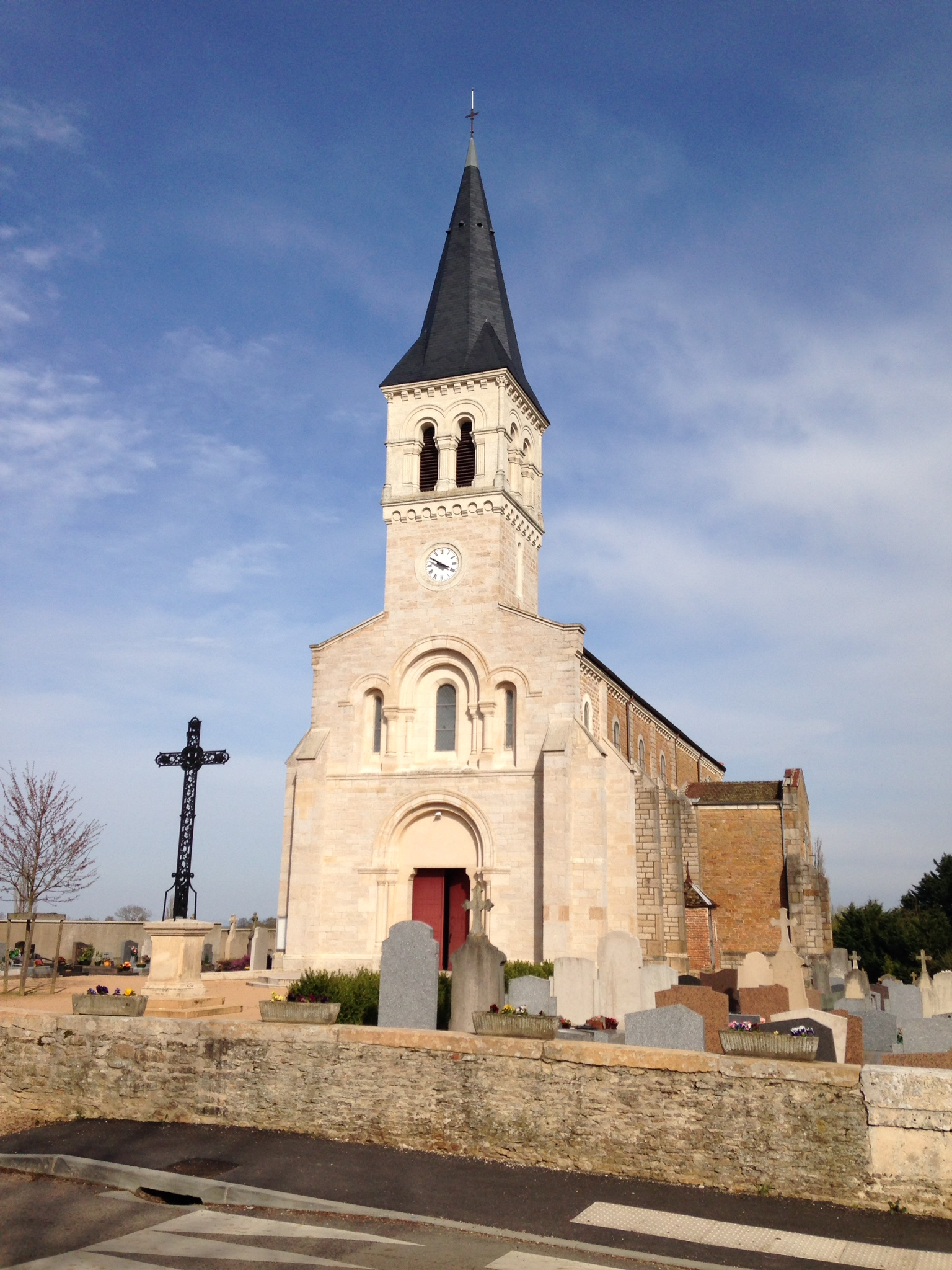 Église du village de Cruzilles-lès-Mépillat